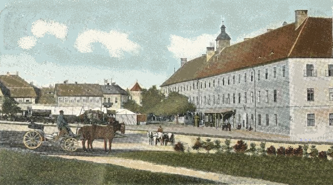 k.k. Infanteriekaserne in Hermannstadt (heute Sibiu/Rumänien)